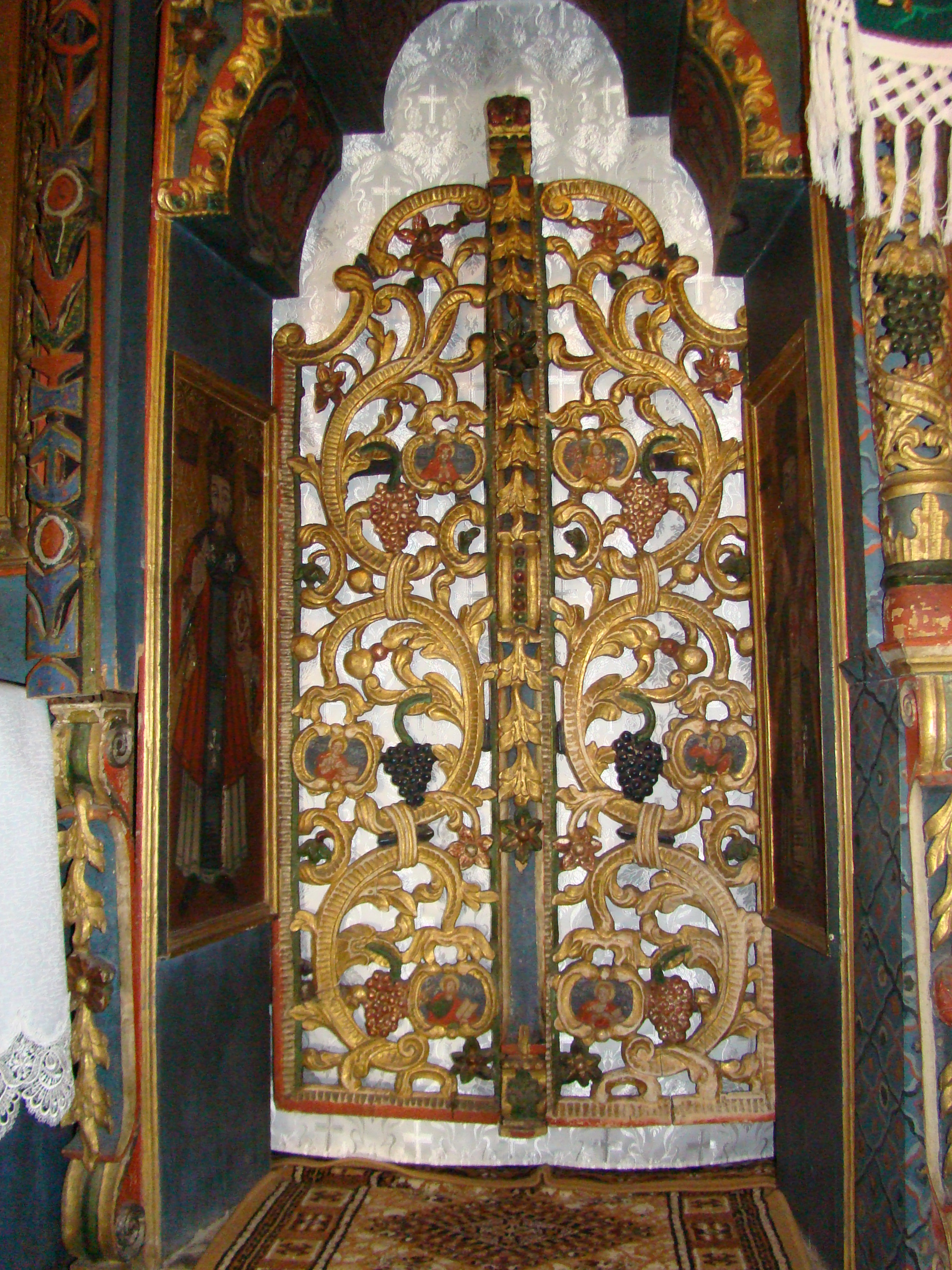 Biserica de lemn "Sfinții Arhangheli Mihail şi Gavril", sat PLOPIŞ; comuna ŞIŞEŞTI